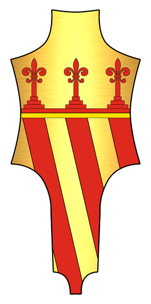 Stemma antico famiglia Trón